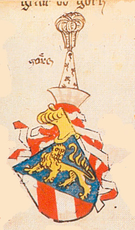 Ingeram-Codex der ehemaligen Bibliothek Cotta graff von goerz freigestellt aus